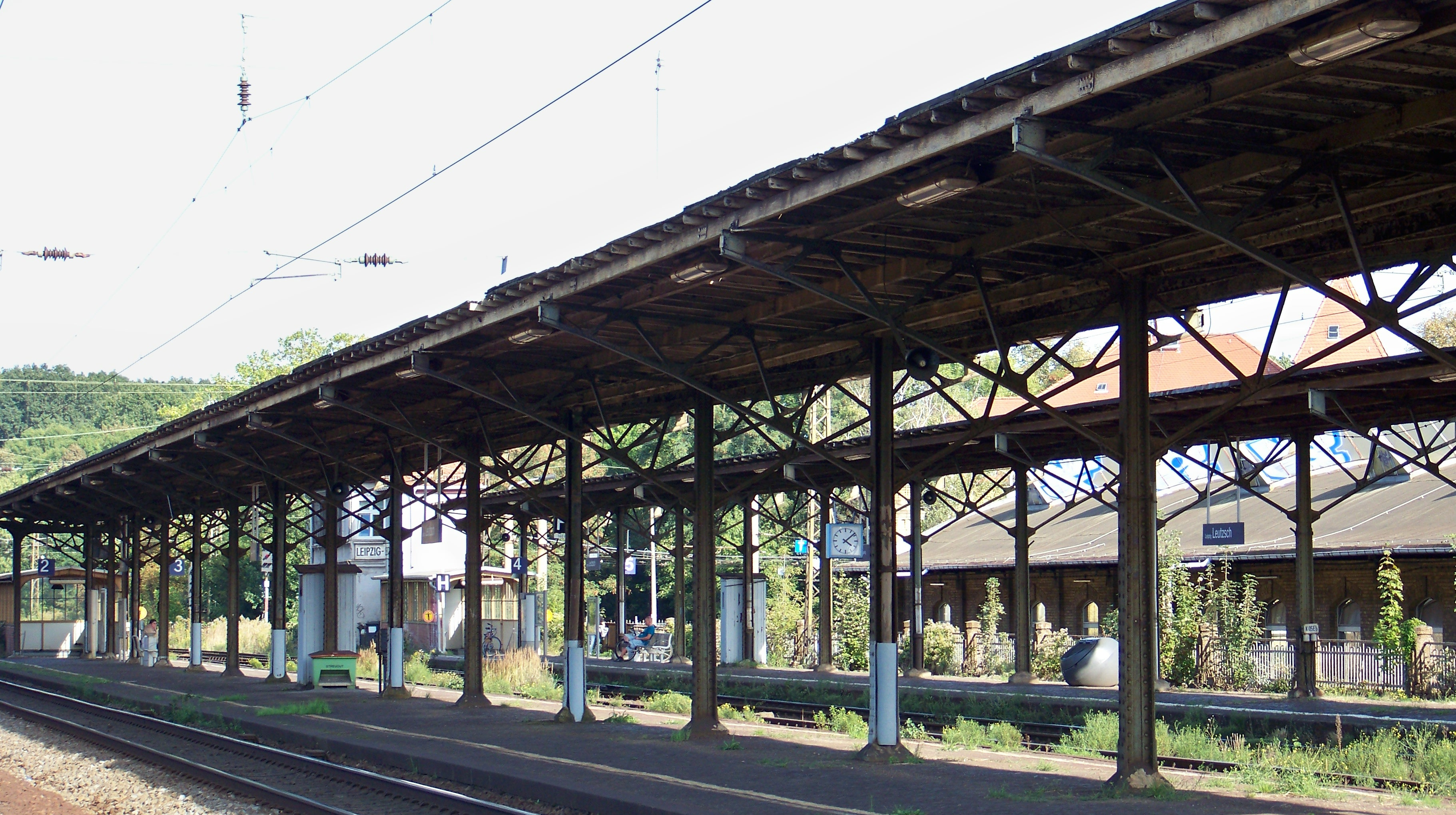 Bahnsteige des Bahnhofs Leipzig Leutzsch